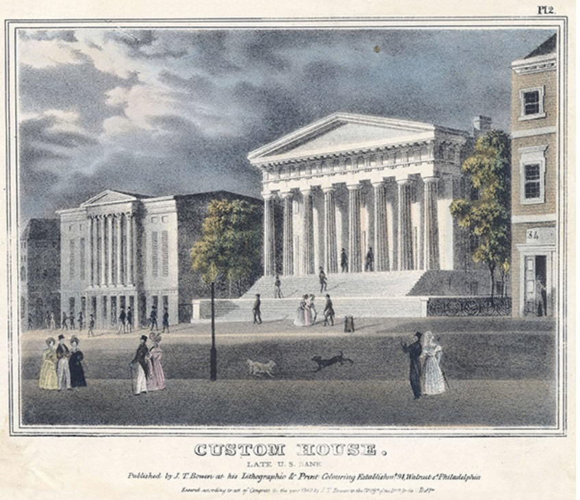 Library Company of Philadelphia